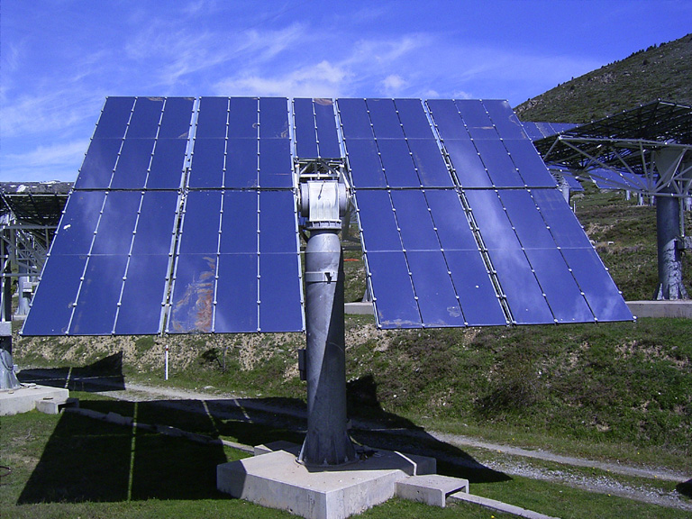 Photographie d'un héliostat du site de Thémis.